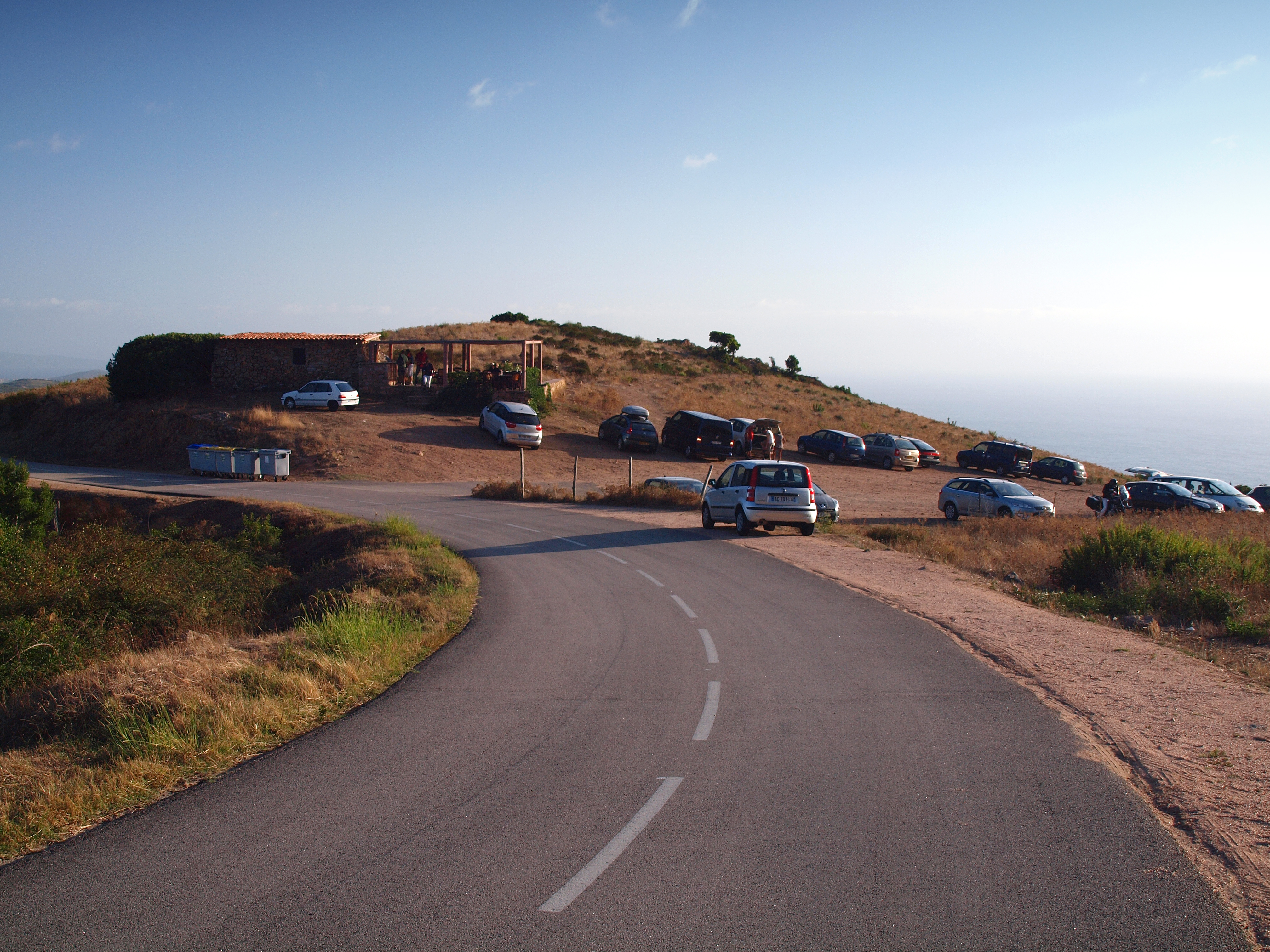 Piana (Corsica) - Départ du sentier pour Capu Rossu